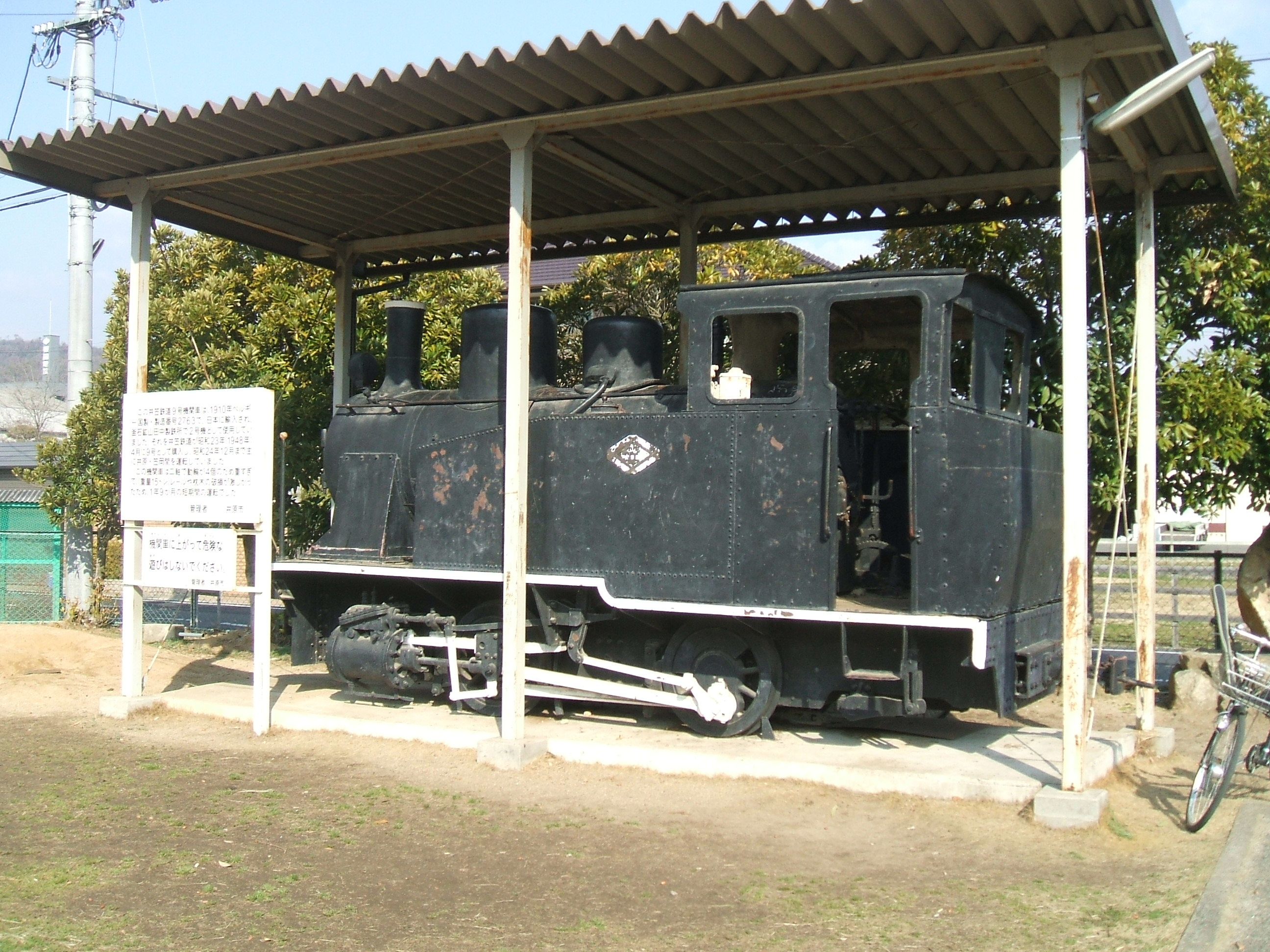 釜石鉱山鉄道E形蒸気機関車、保存されている井笠鉄道9号機関車を撮影